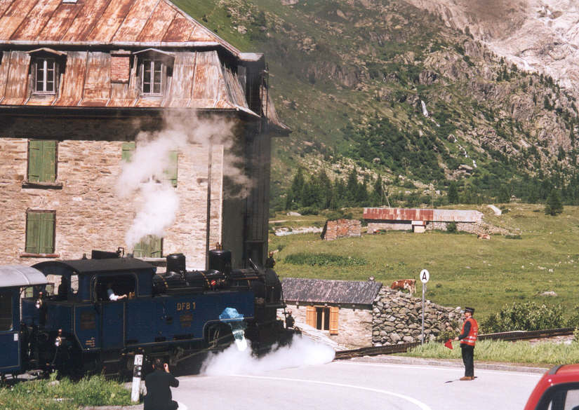 Spoorwegovergang Gletsch, de stoomloc DFB 1 vertrekt naar Muttbach. Foto zomer 2001, Angélique Leunissen.